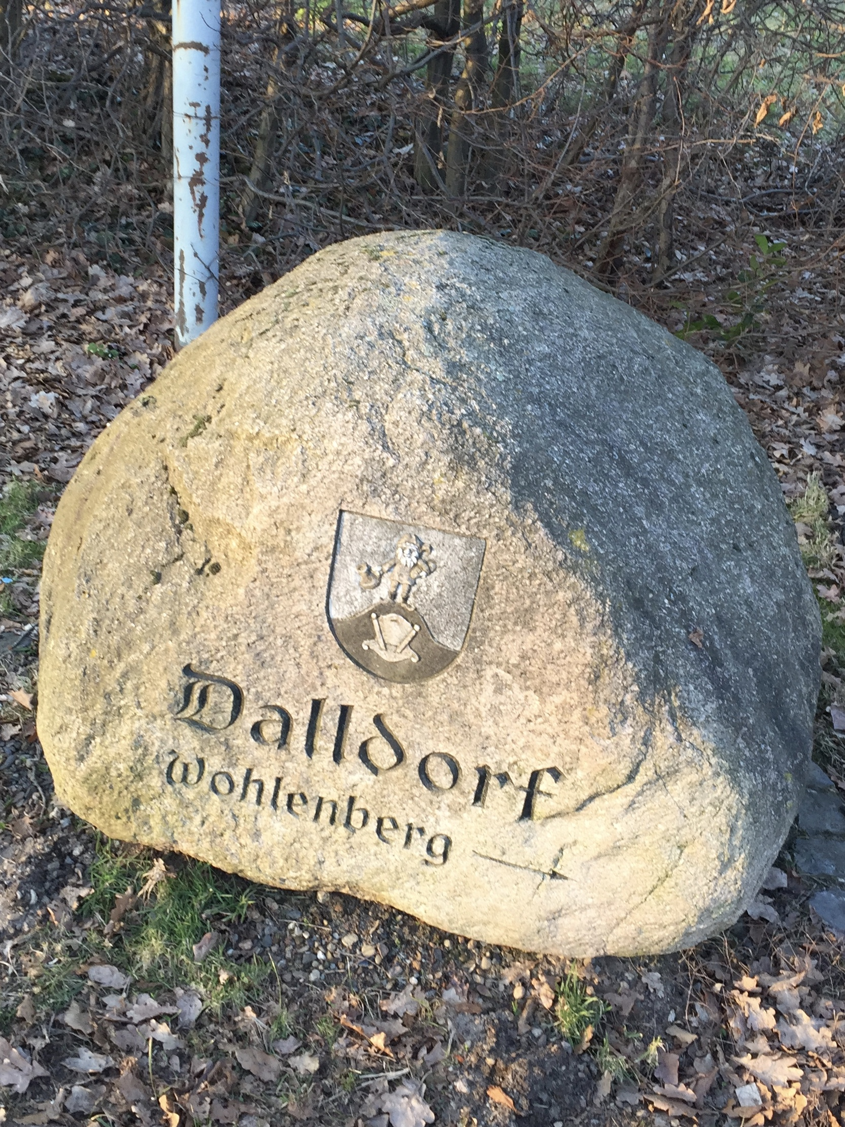 Großer Stein in Dalldorf als Wegweiser zum Wohlenberg